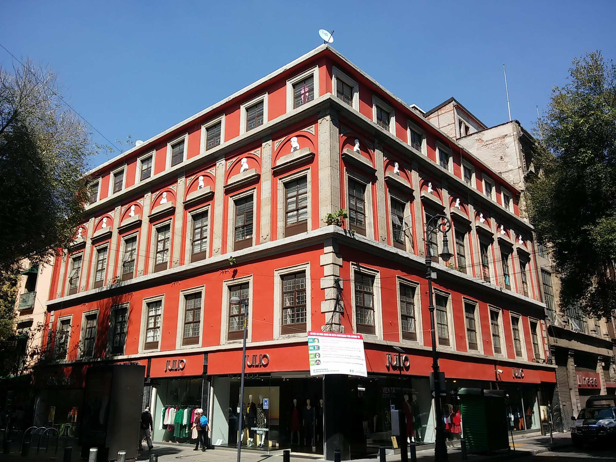 Antiguo hotel de la Bella Unión en el Centro Histórico de la Ciudad de México